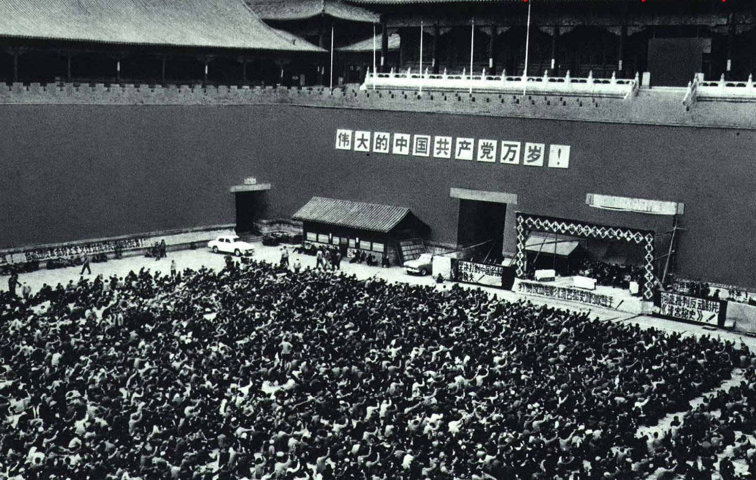 1967-11 1967年 午门前批评 清宫秘史